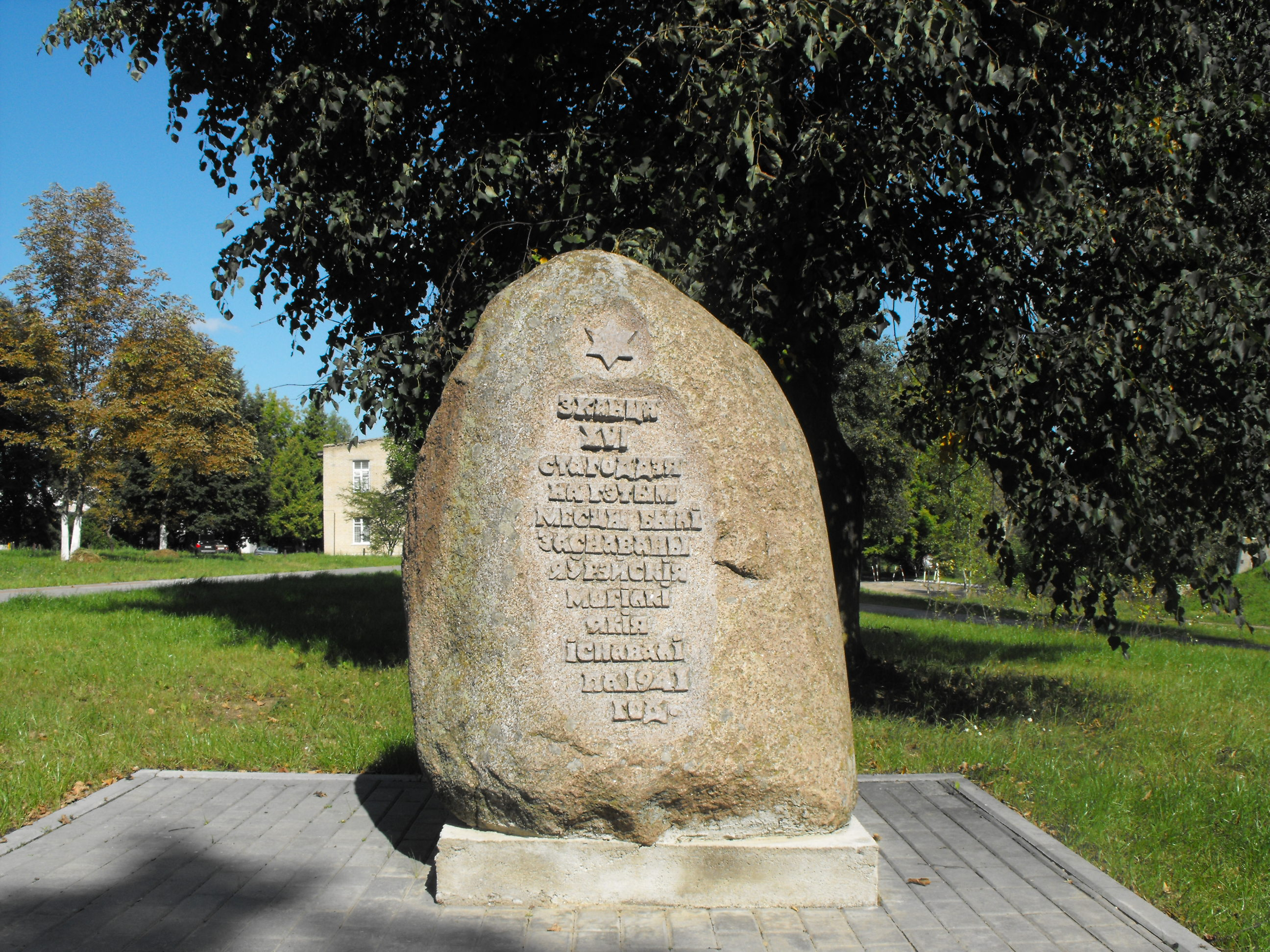 Камень на месте бывшего еврейского кладбища в Лиде